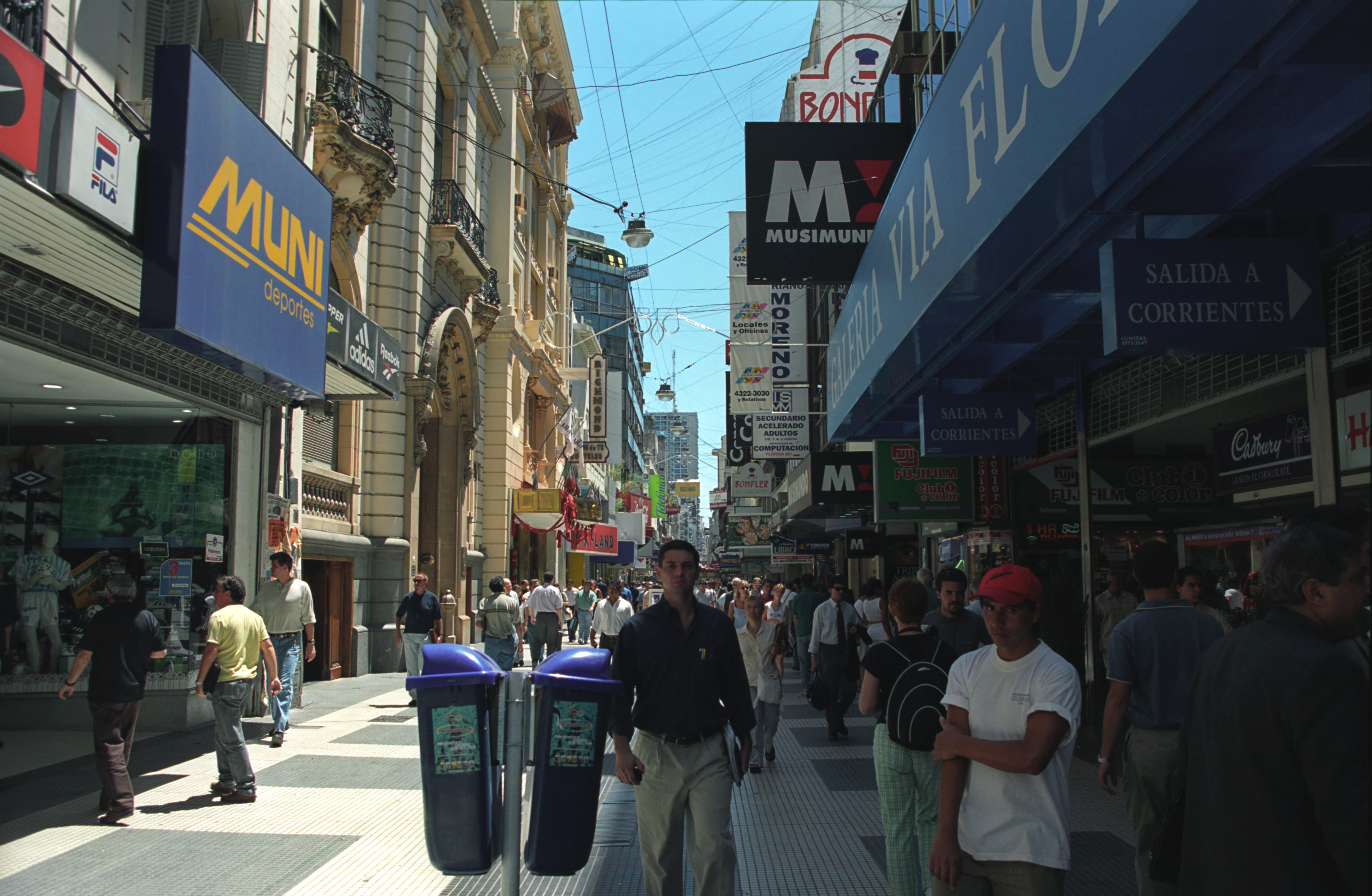 Ulica Florida, Buenos Aires